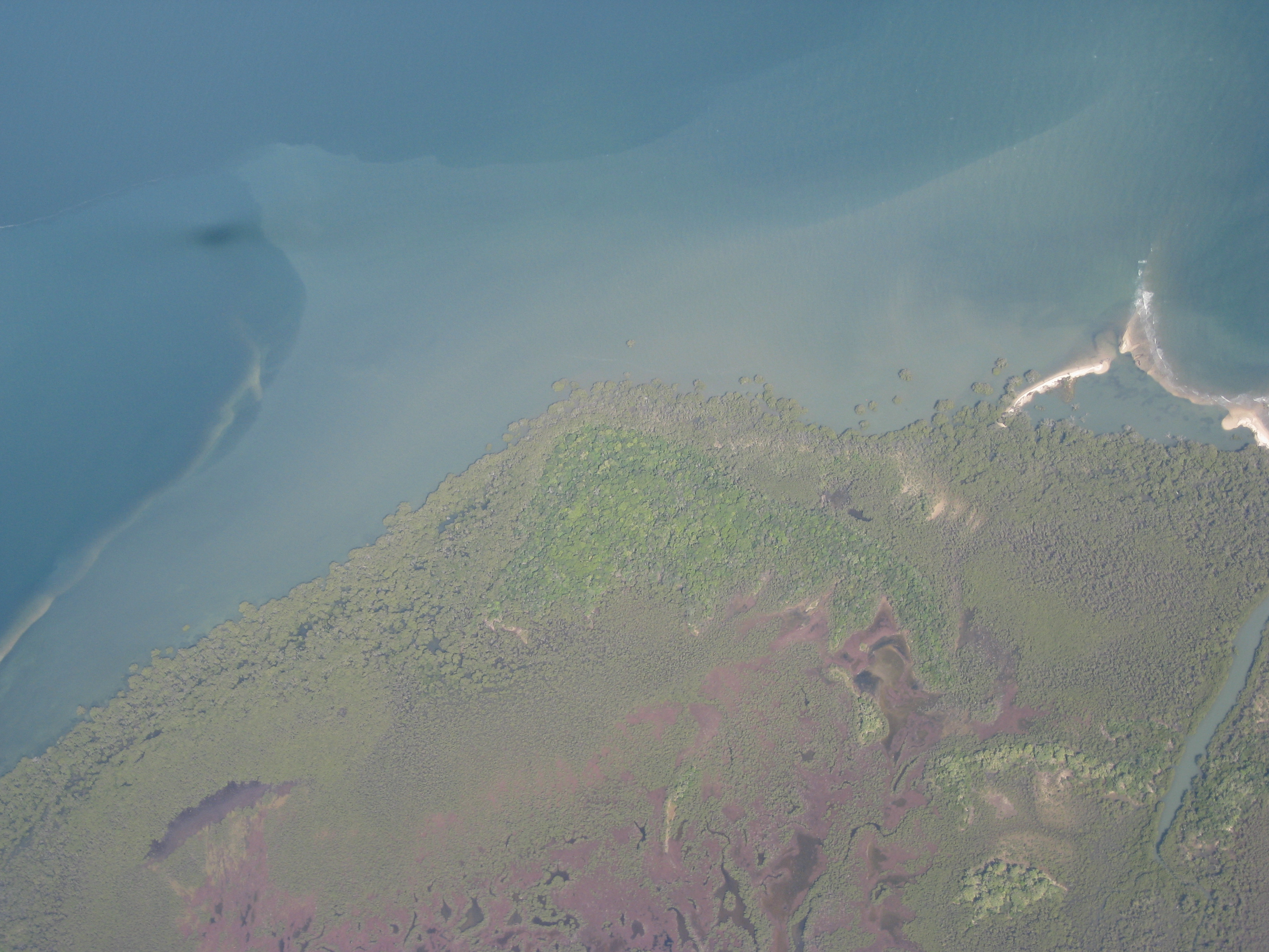 i09_0425 041